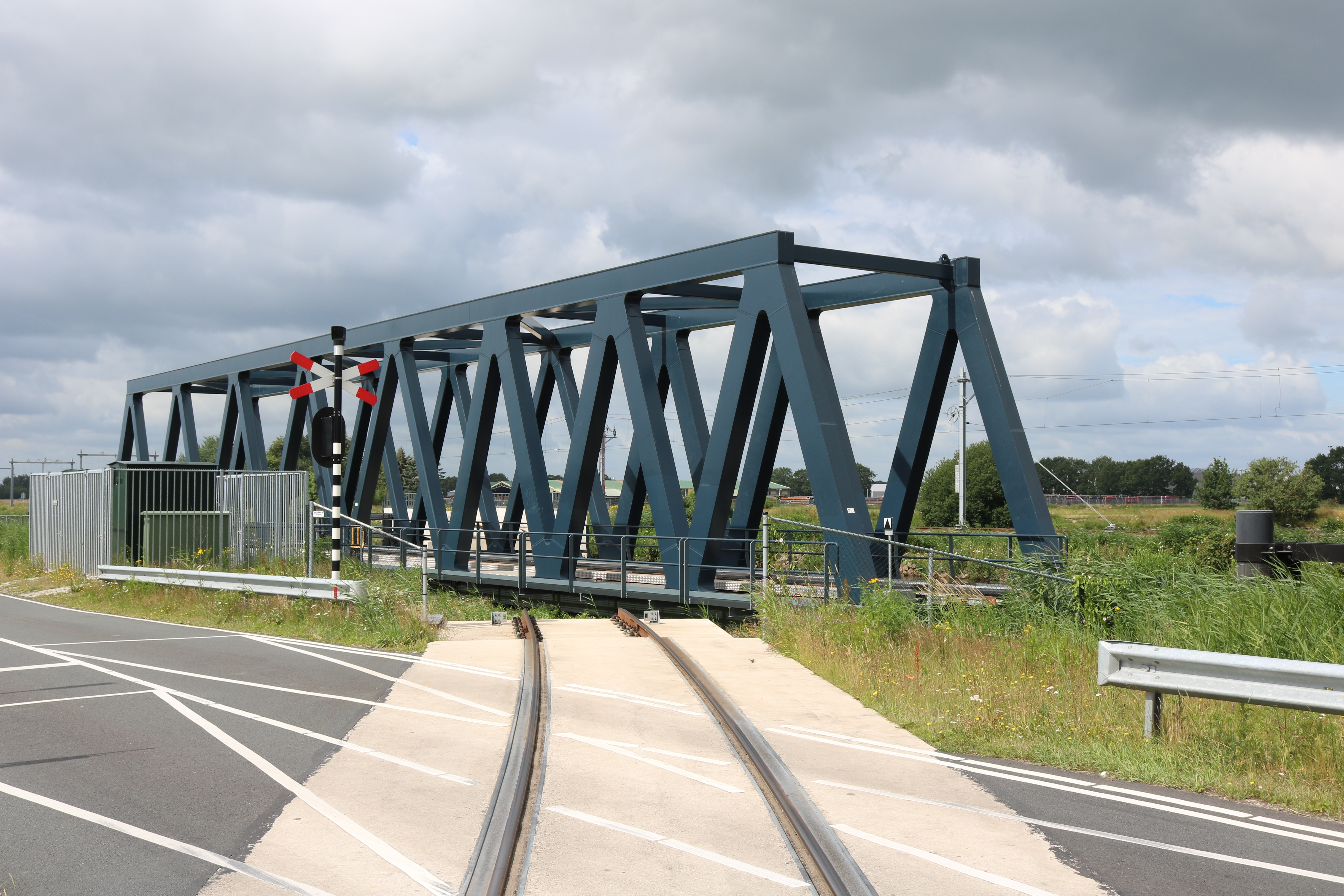 De nieuwe draaibrug (foto: Daniel van der Ree, 23 juni 2018)